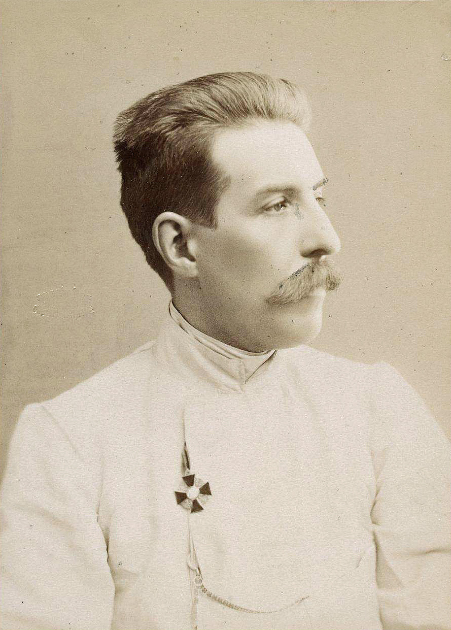 Joseph de Baye (1853-1931). Portrait